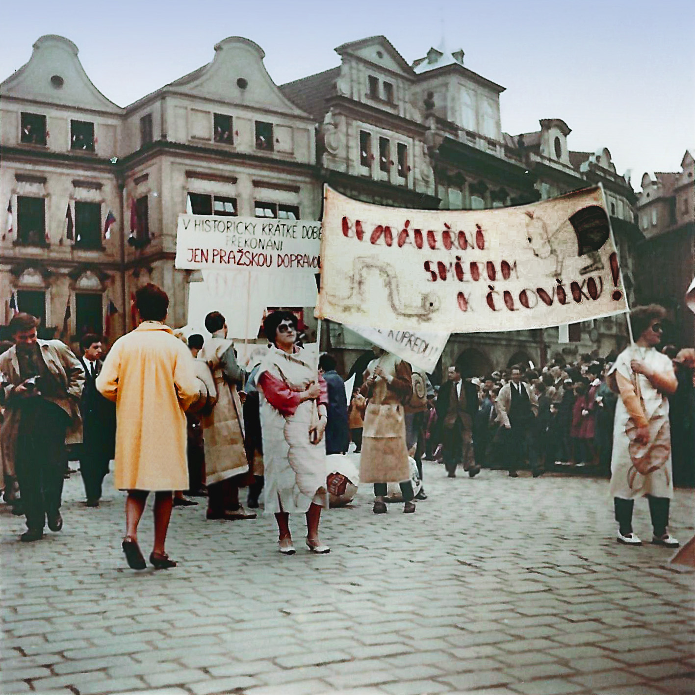 Majáles 1965 - průvod studentů Prahou